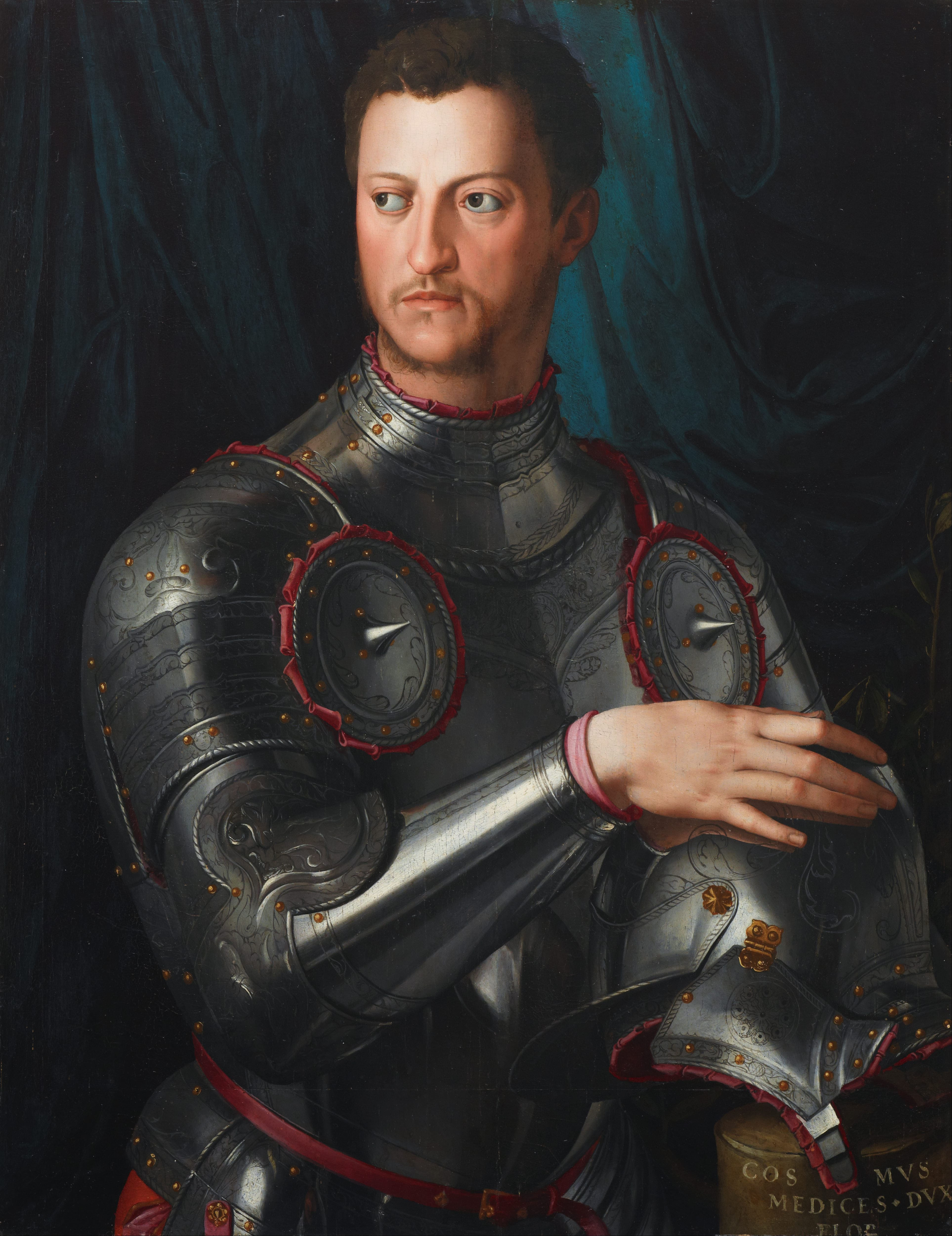 Replica, conservata nell'Art Gallery of New South Wales, del ritratto del granduca Cosimo I de' Medici in armatura, di Angelo Bronzino (1503–1572). La versione più celebre è quella oggi nella Galleria degli Uffizi di Firenze.